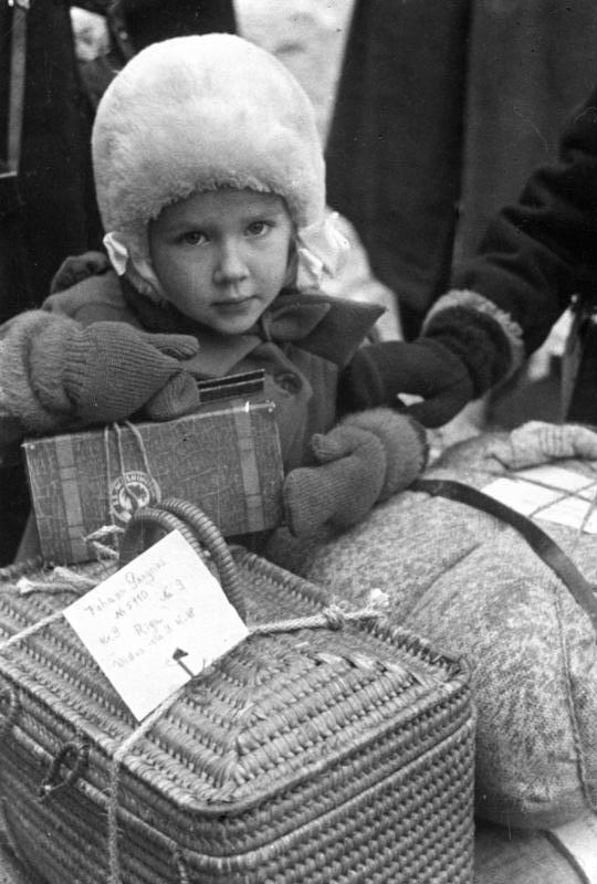 Umsiedlung Baltendeutscher, Mädchen Kleine Baltendeutsche mit grossem Gepäck auf der Rückwanderung, 1939 [Umsiedlung Baltendeutscher.- Mädchen mit Pelzmütze beim Gepäck.]